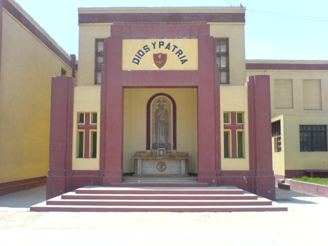 Capilla del Colegio Militar "Leoncio Prado" donde se encuentra la imagen de Jesus,obra del artista.